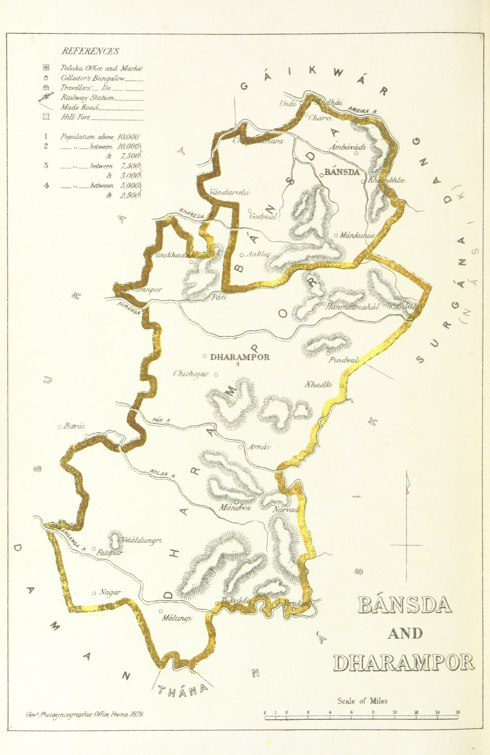 Bansda and Dharampur, British India. 1896